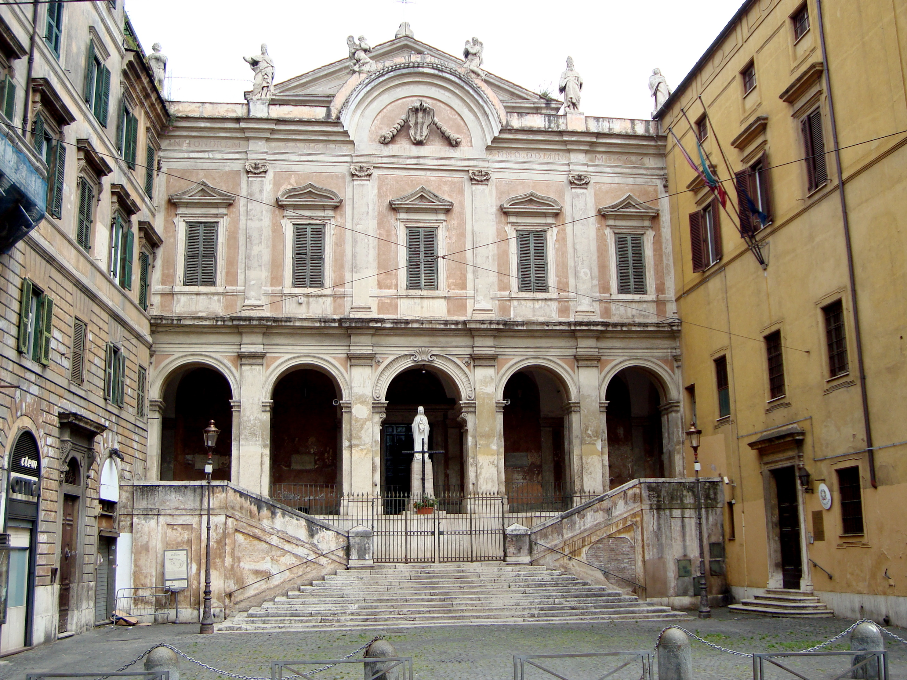 Eglise de Sant'Eusebio all'Esquillino sur la via Napoleone III à Rome